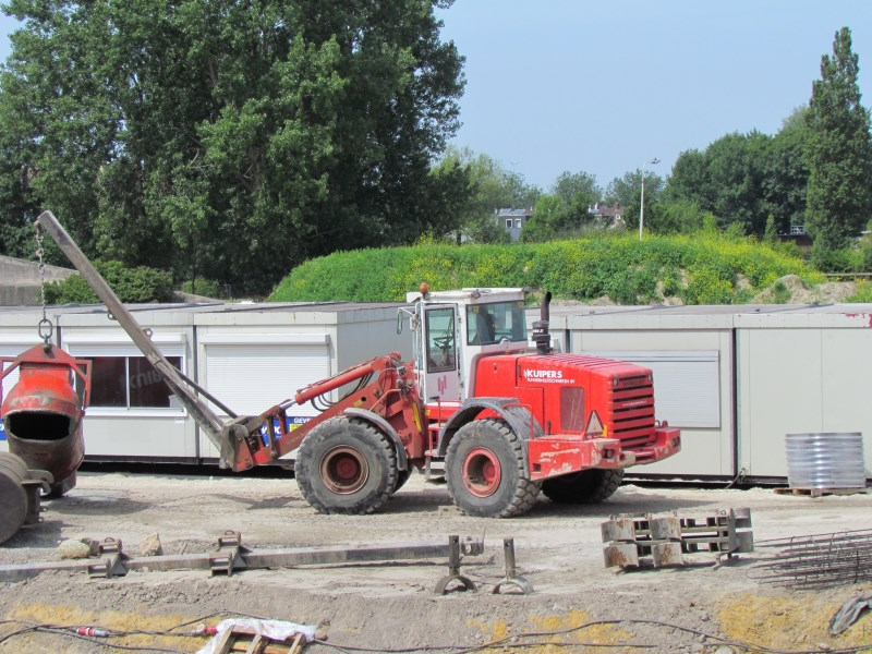 Werklust WG45E